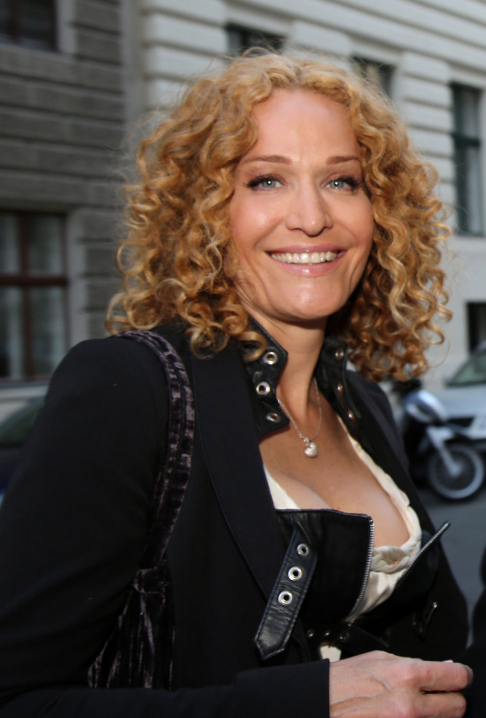 Giuliani_Marie-Christine-Moderatorin-2399